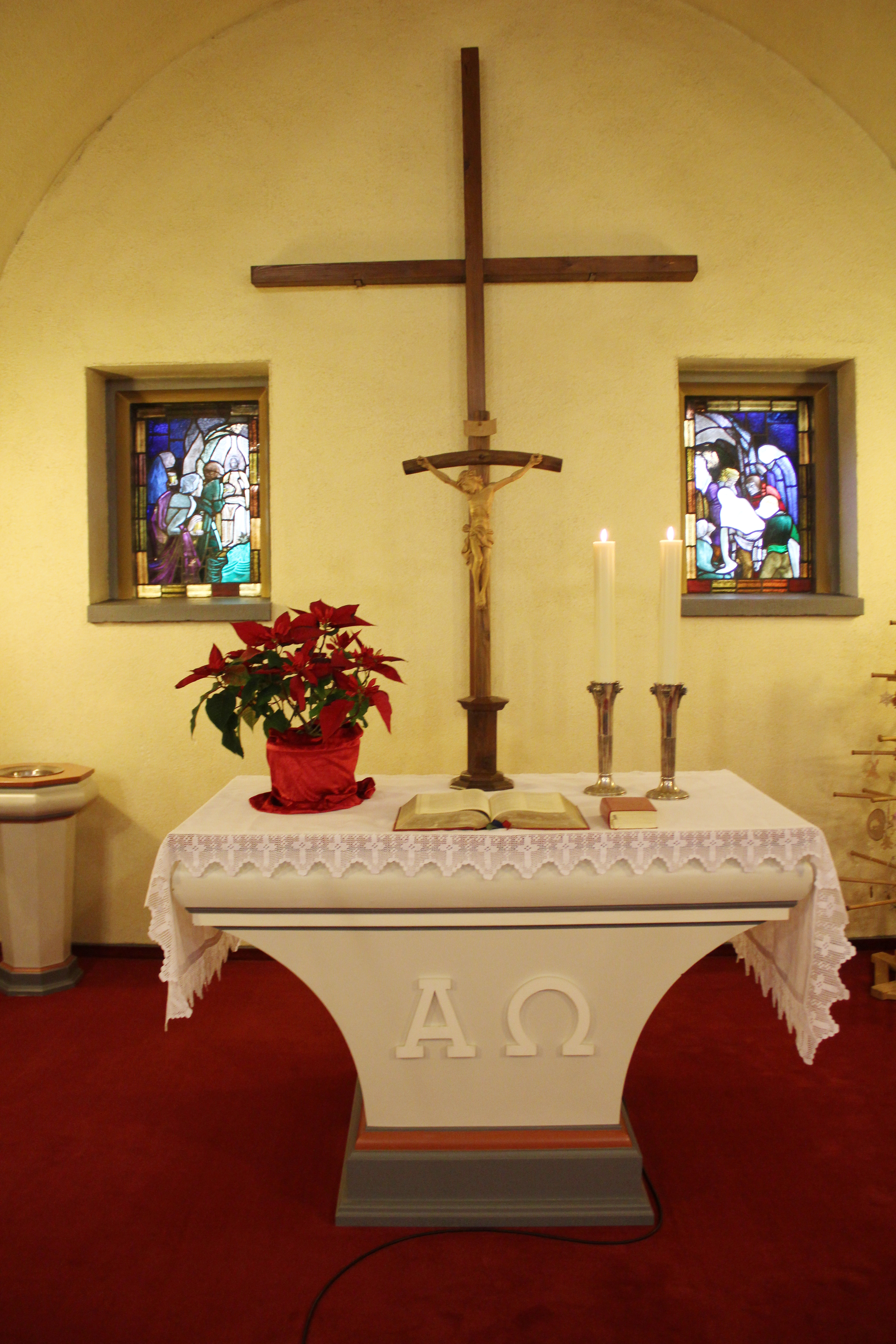 Evangelische Kirche Münchholzhausen, Wetzlar, Lahn-Dill-Kreis, Hessen, Deutschland